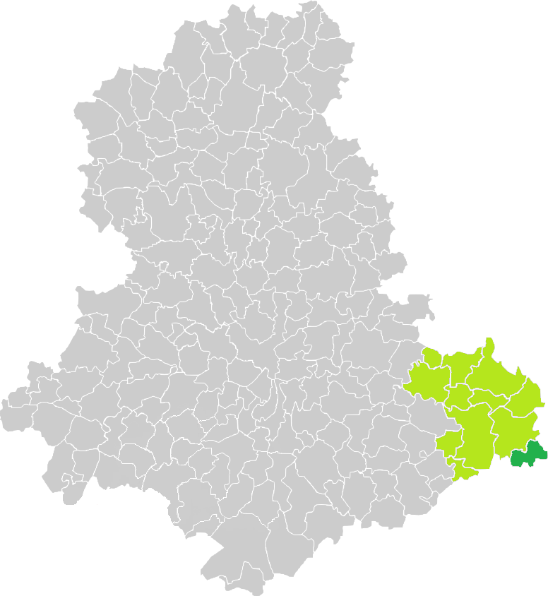 Carte de situation de la commune de Rempnat (en vert foncé) dans le votre Canton (en vert clair) sur une carte des communes de la Haute-Vienne